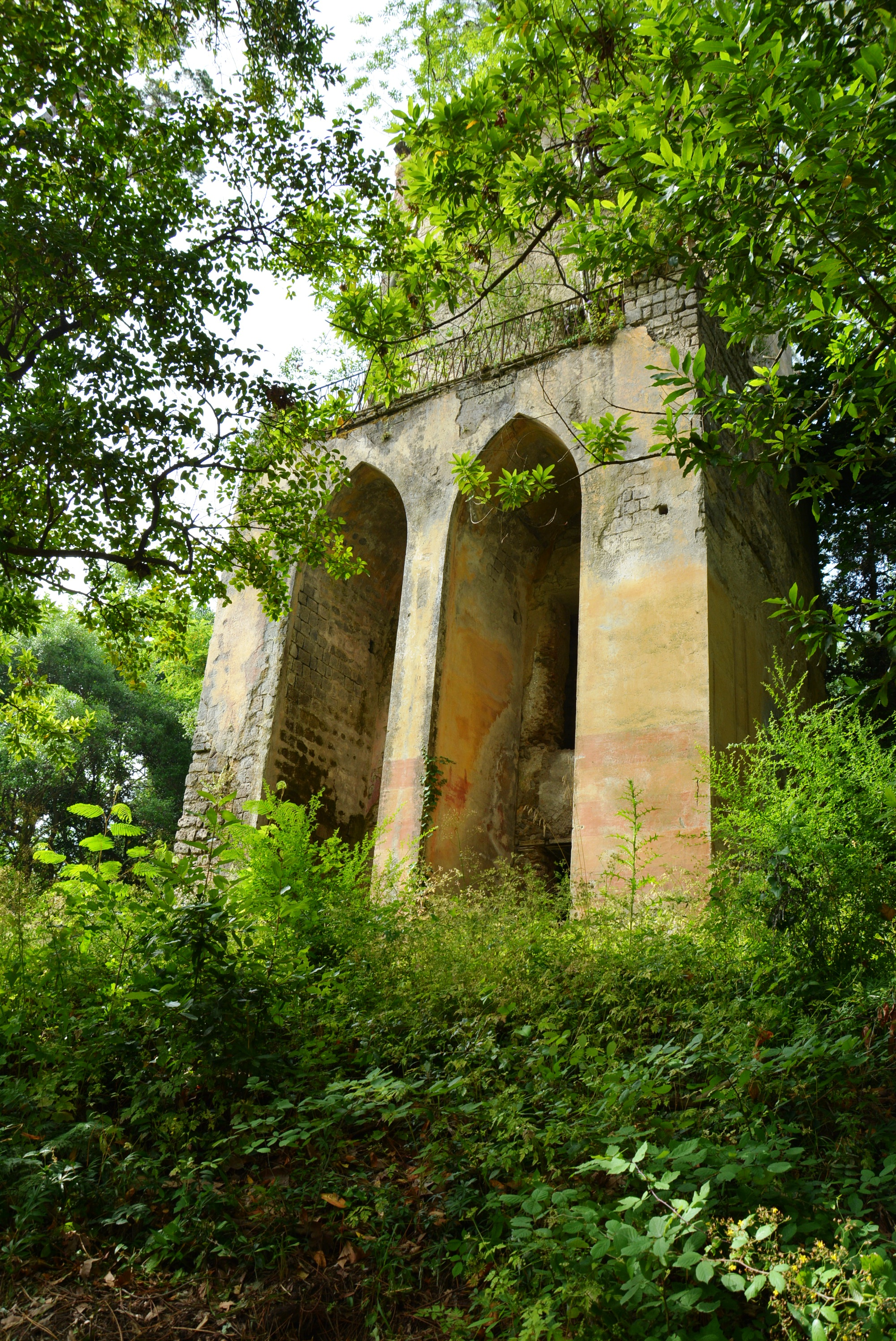 Reggia di Quisisana a Castellammare di Stabia